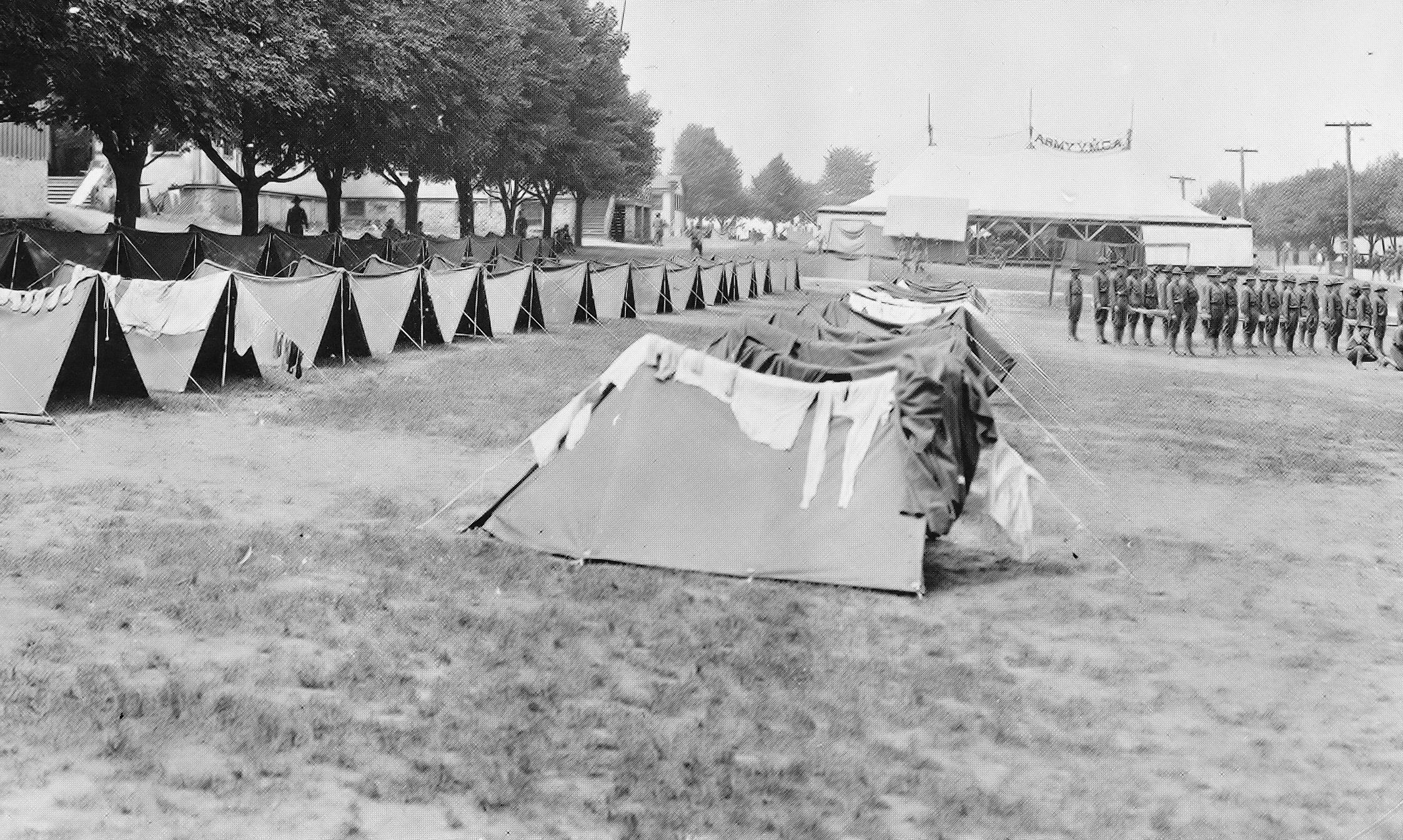 Corsu: Pup Tents at Camp Crane, Pennsylvania